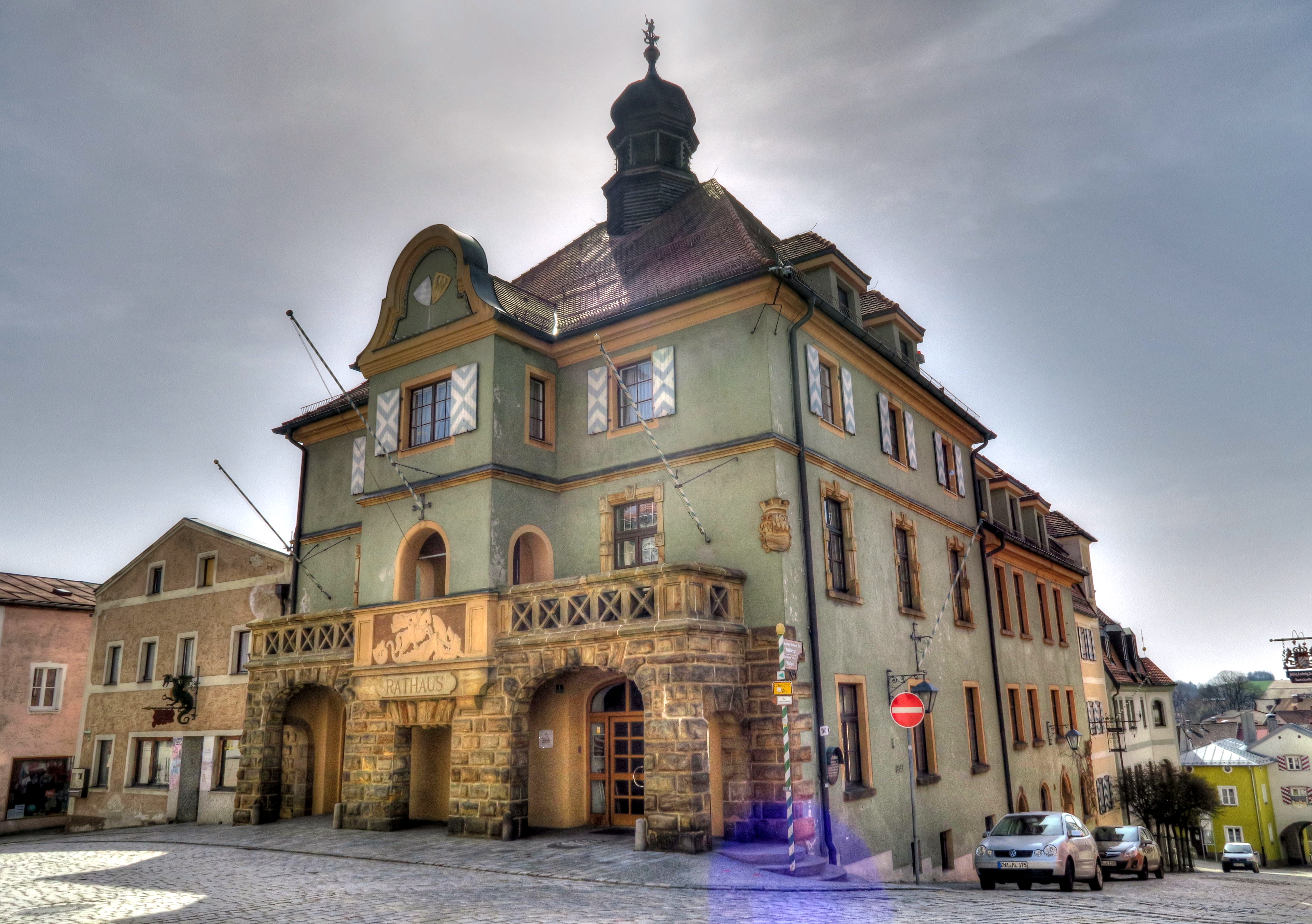 Deutschland, Bayern, Regierungsbezirk Oberpfalz, Landkreis Cham, Furth im Wald, Rathaus